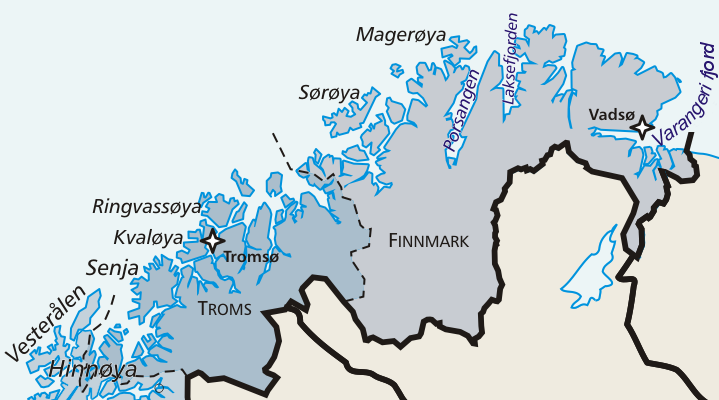 Norra põhjaosa kaart